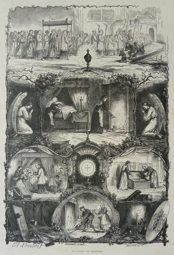 Mirakel van Amsterdam, gravure J. Walter (coll. Catharijne Convent)